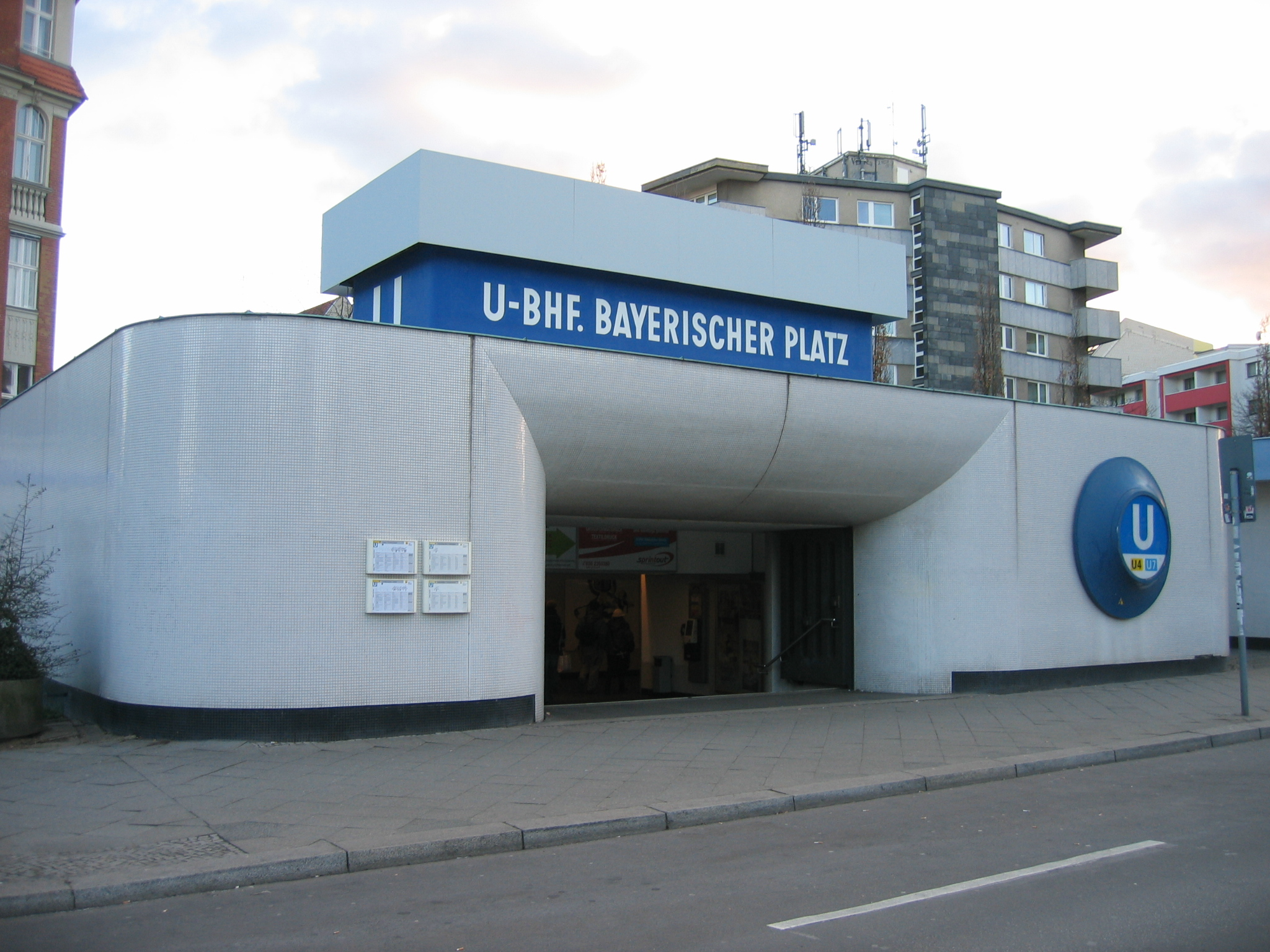 Eingangsgebäude U-Bahnhof Bayerischer Platz, Berlin